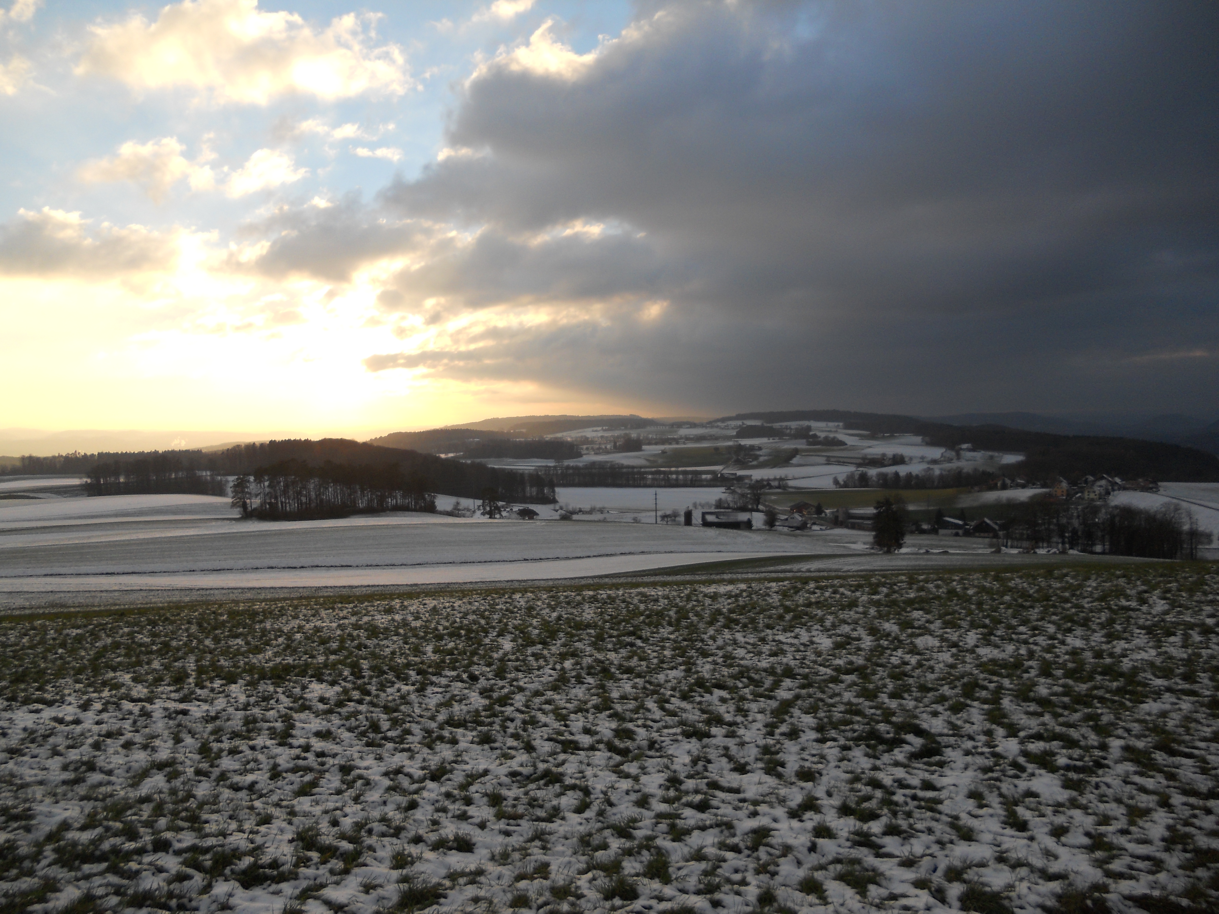 Sasseloo, Homburg.